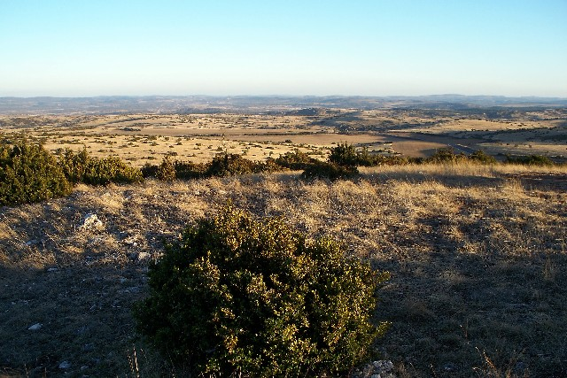 Le plateau du Larzac